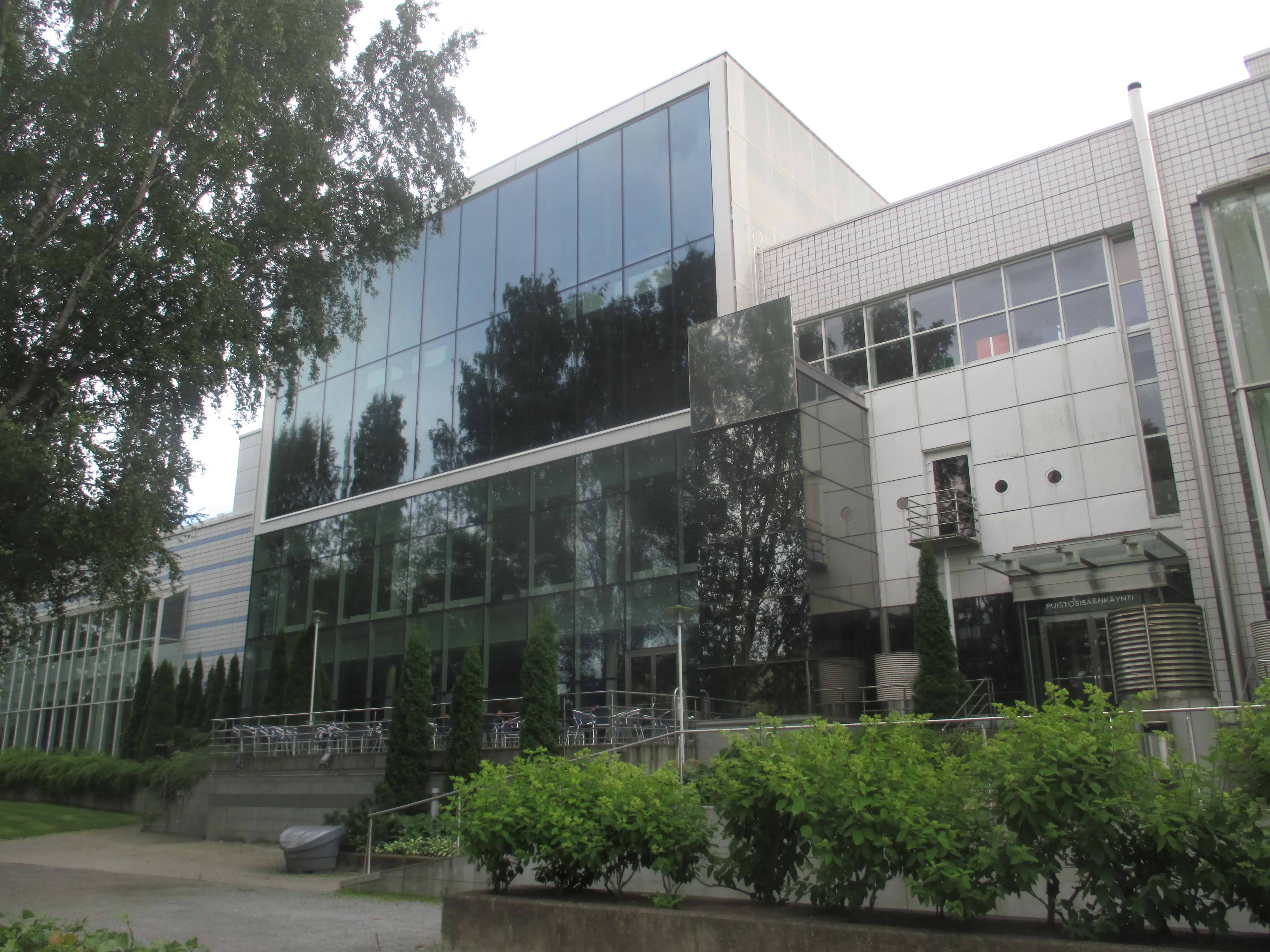 Tampere Hall